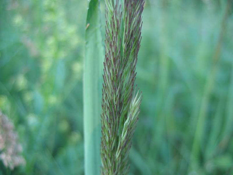 Sand-Reitgras Calamagrostis epigejos